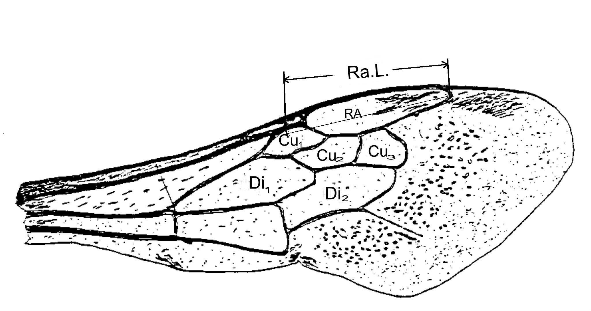 Radialcelle: Humlevinge tegnet av Atle Mjelde.